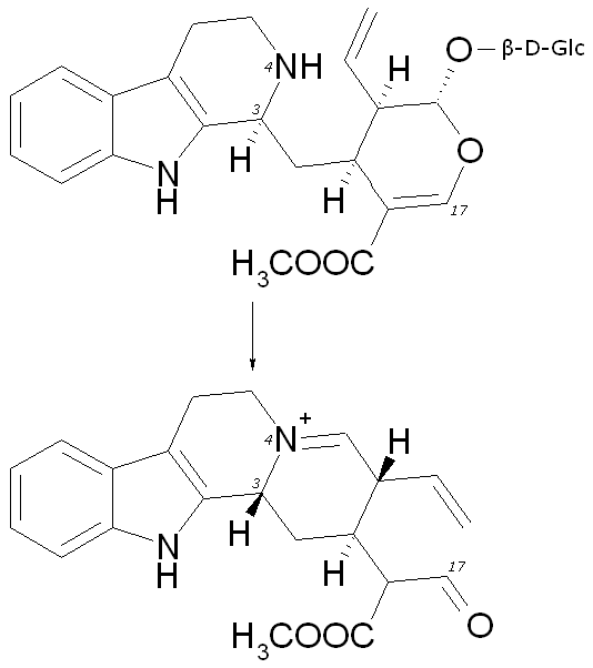 Reserpin-Biosynthese Teil 2: 3-epi-Dehydrocorynantheinaldehyd